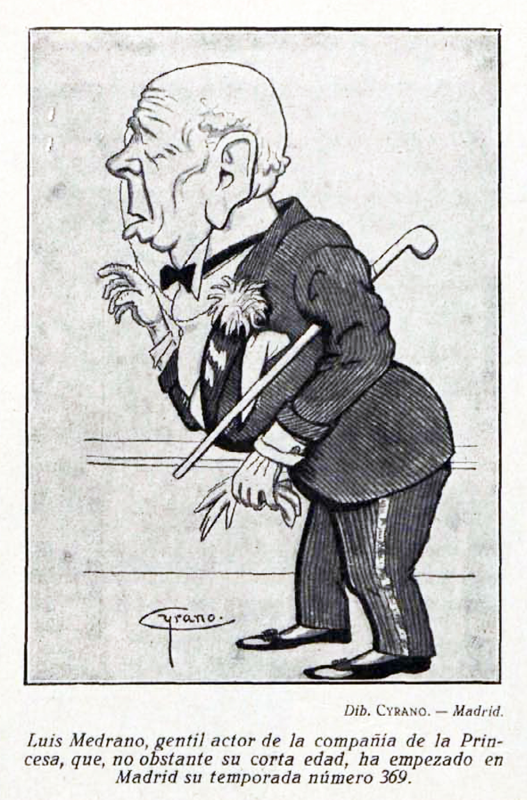 Luis Medrano. Caricatura en Buen Humor.